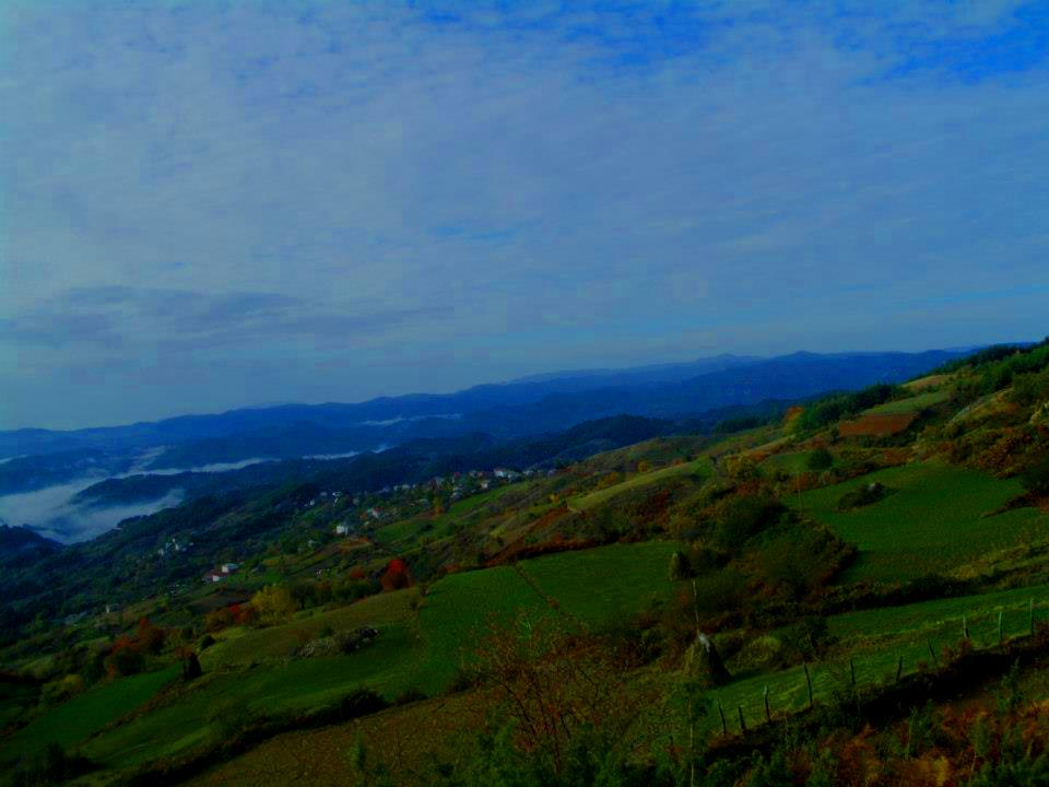 Изглед към Гърнати